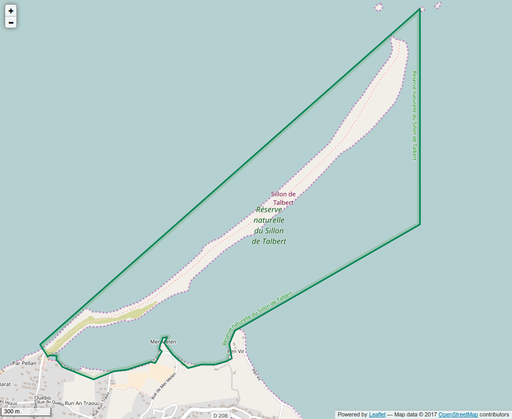 Périmètre de la RNR du Sillon de Talbert.